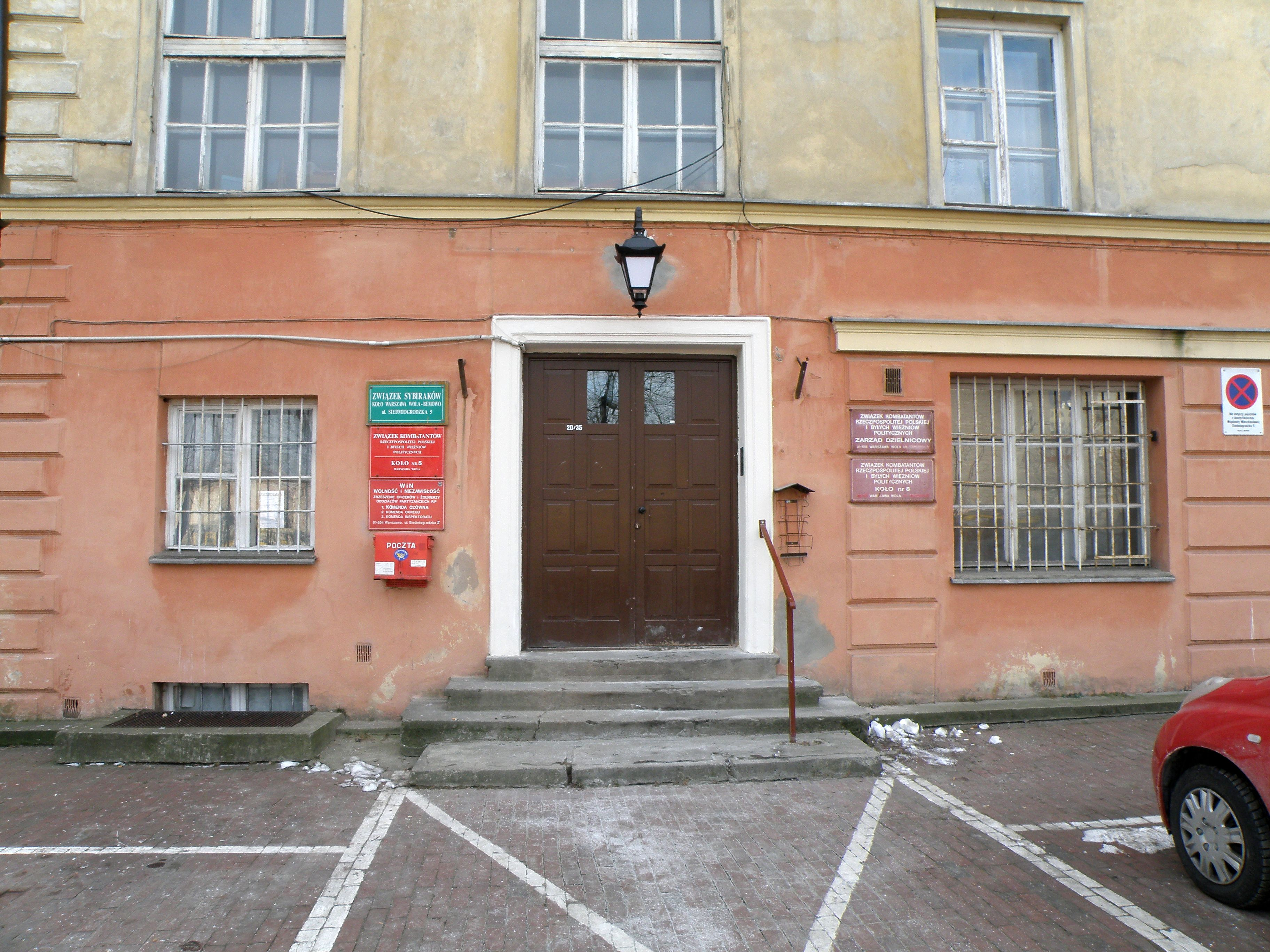 Budynek Warszawa ul. Młynarska obecnie Siedmiogrodzka - dom tramwajarzy, obecnie siedziba różnych organizacji